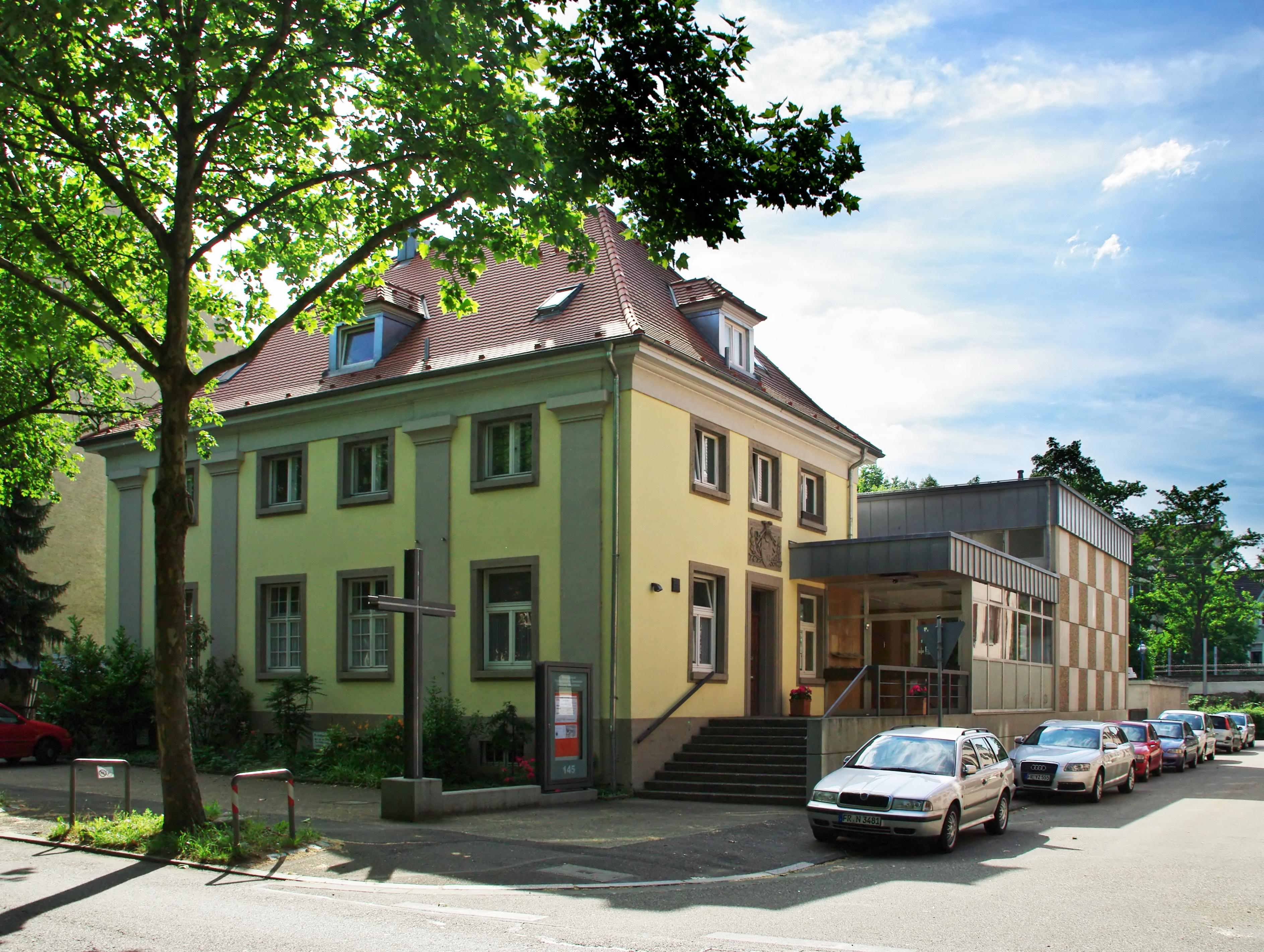 Die Kirche der Baptisten in Freiburg Aussenansicht